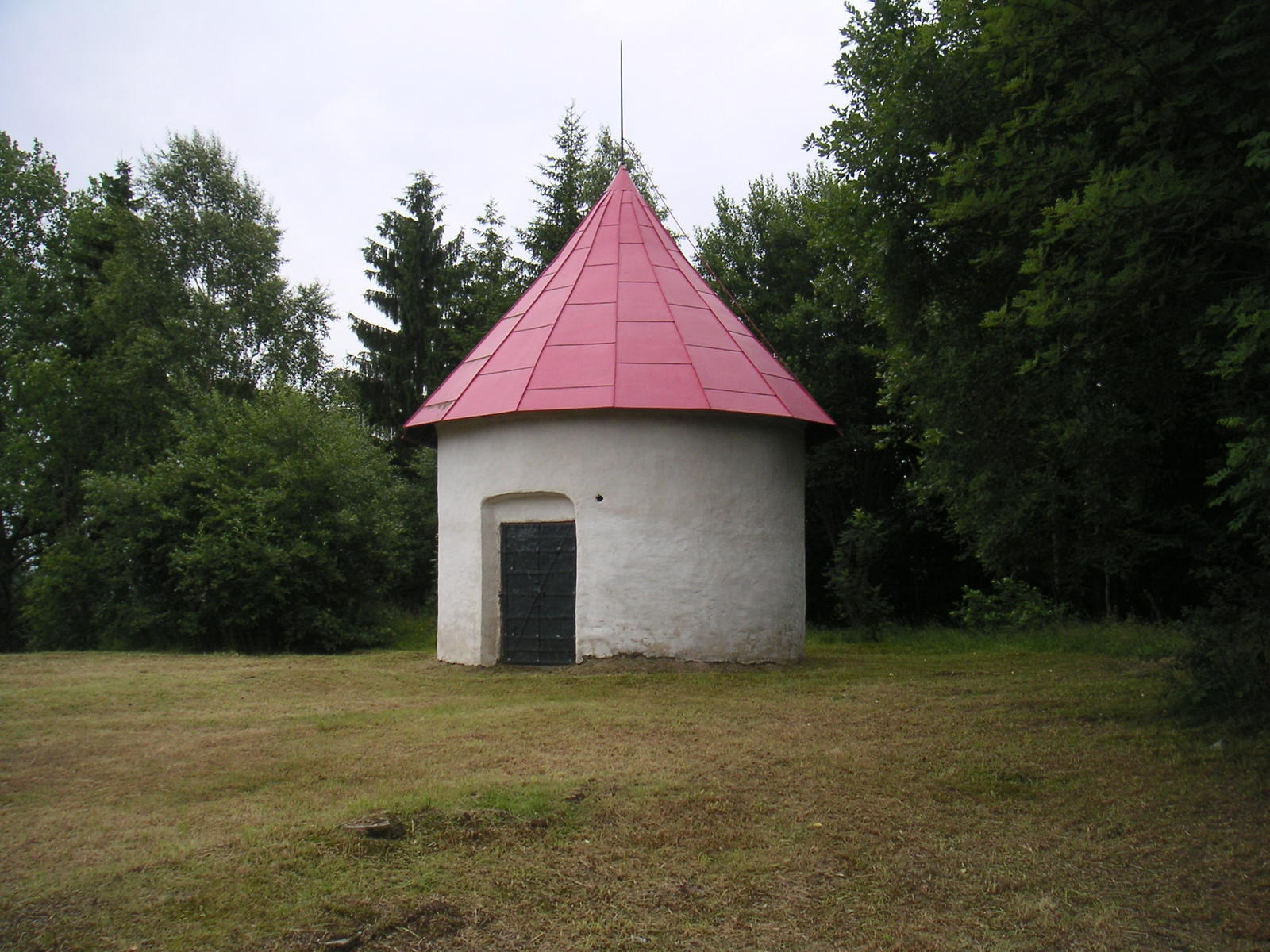 Pulverturm in Johanngeorgenstadt